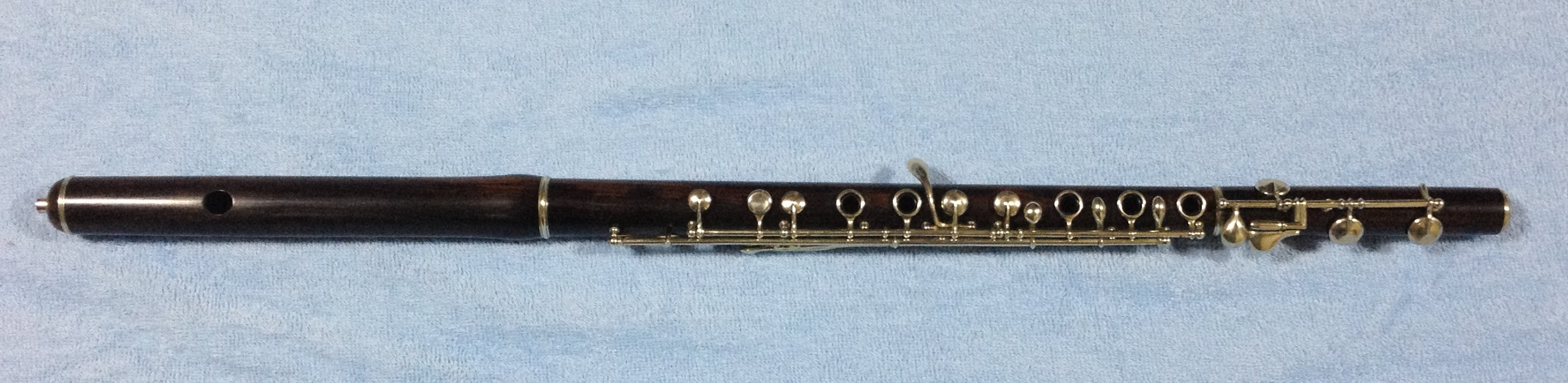 円錐ベーム式フルート 製作者：J.Martin